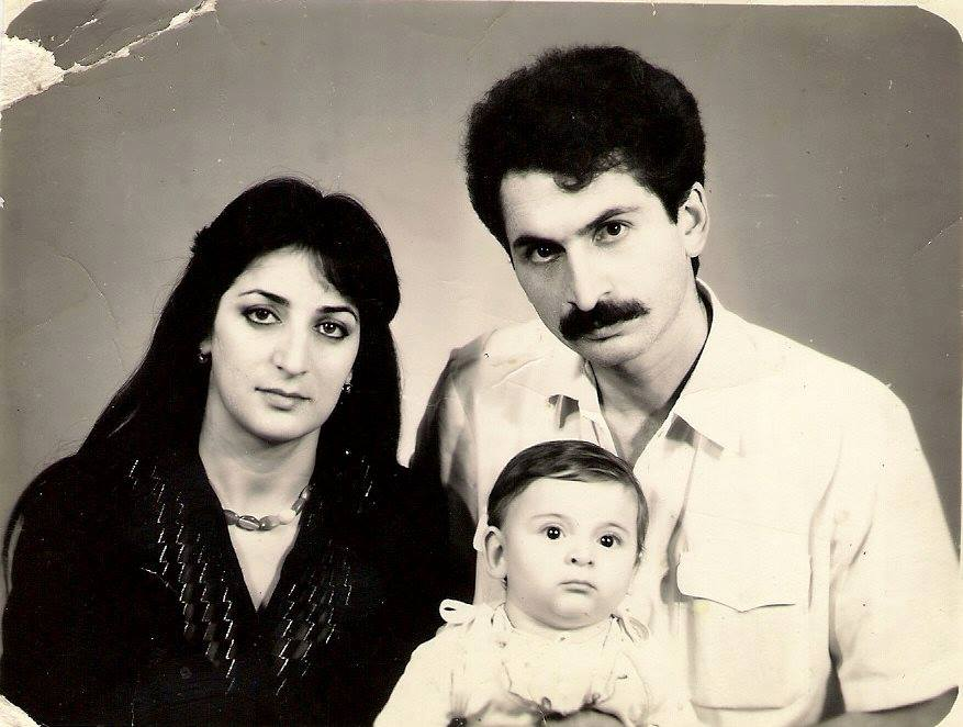 Bu şəkil cəsədin sol döş cibindən çıxmışdır.